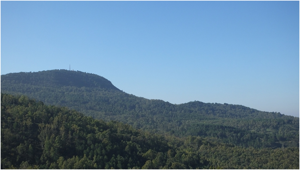 panoramica di monte manganello